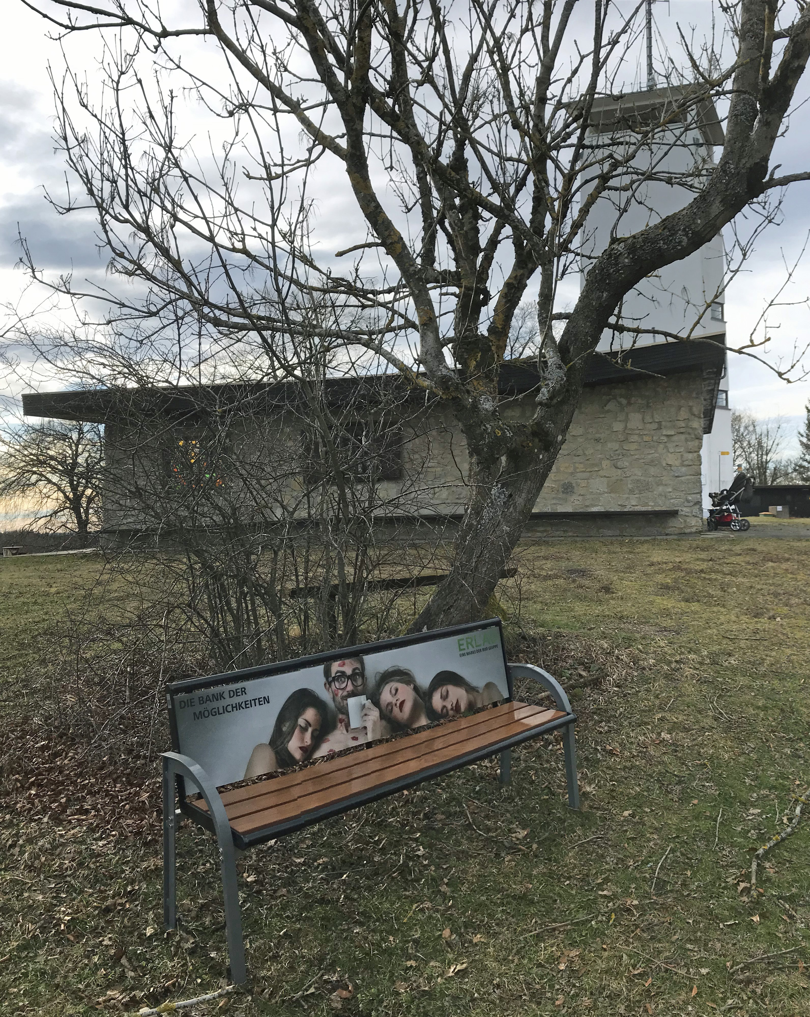 Die von der Firma RUD Ketten Rieger & Dietz gestiftete Erlau-Bank auf dem Volkmarsberg bei Oberkochen erregte Anfang 2020 Ärgernis.